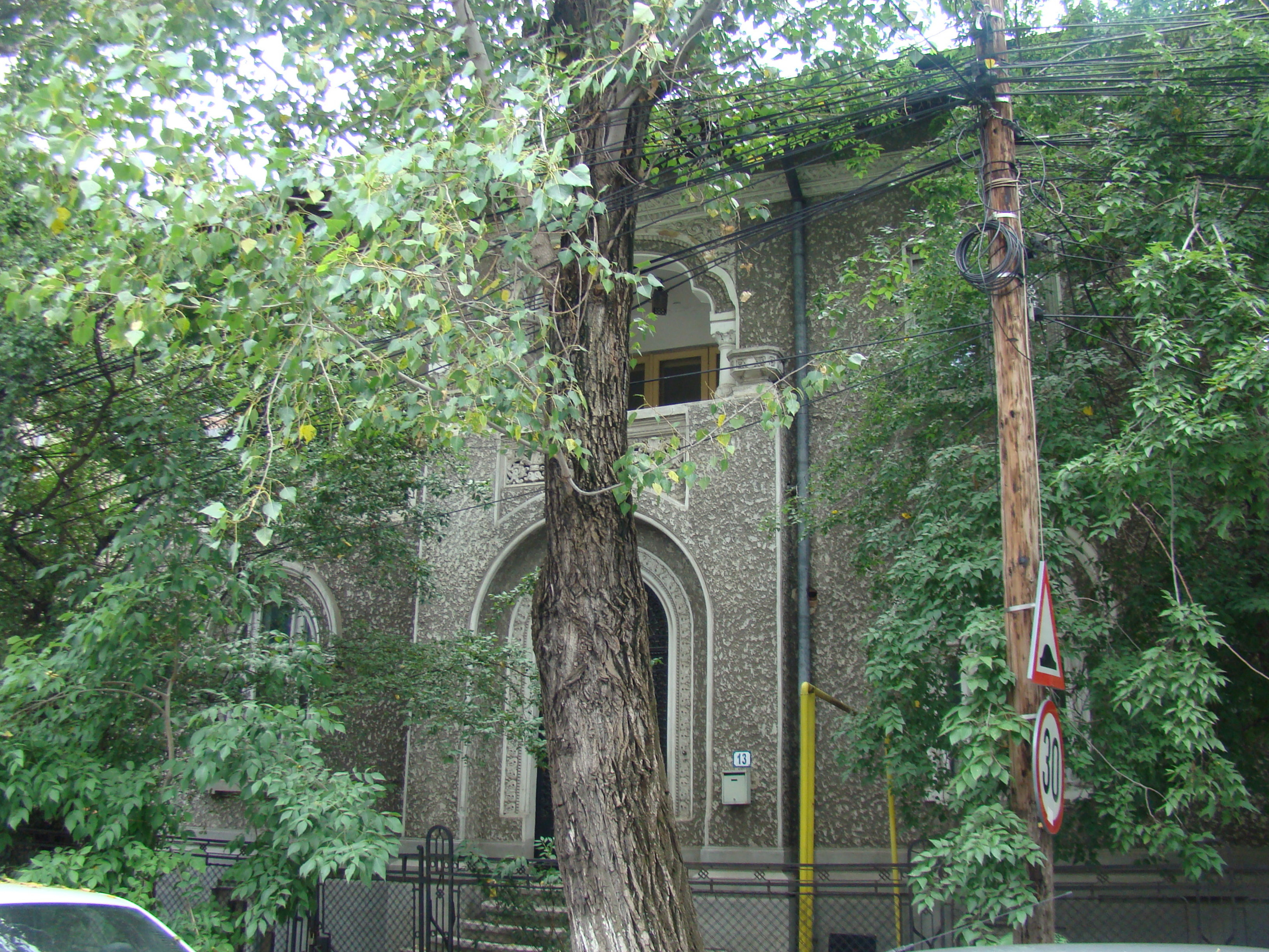 Casă monument istoric, str.Londra, nr. 13